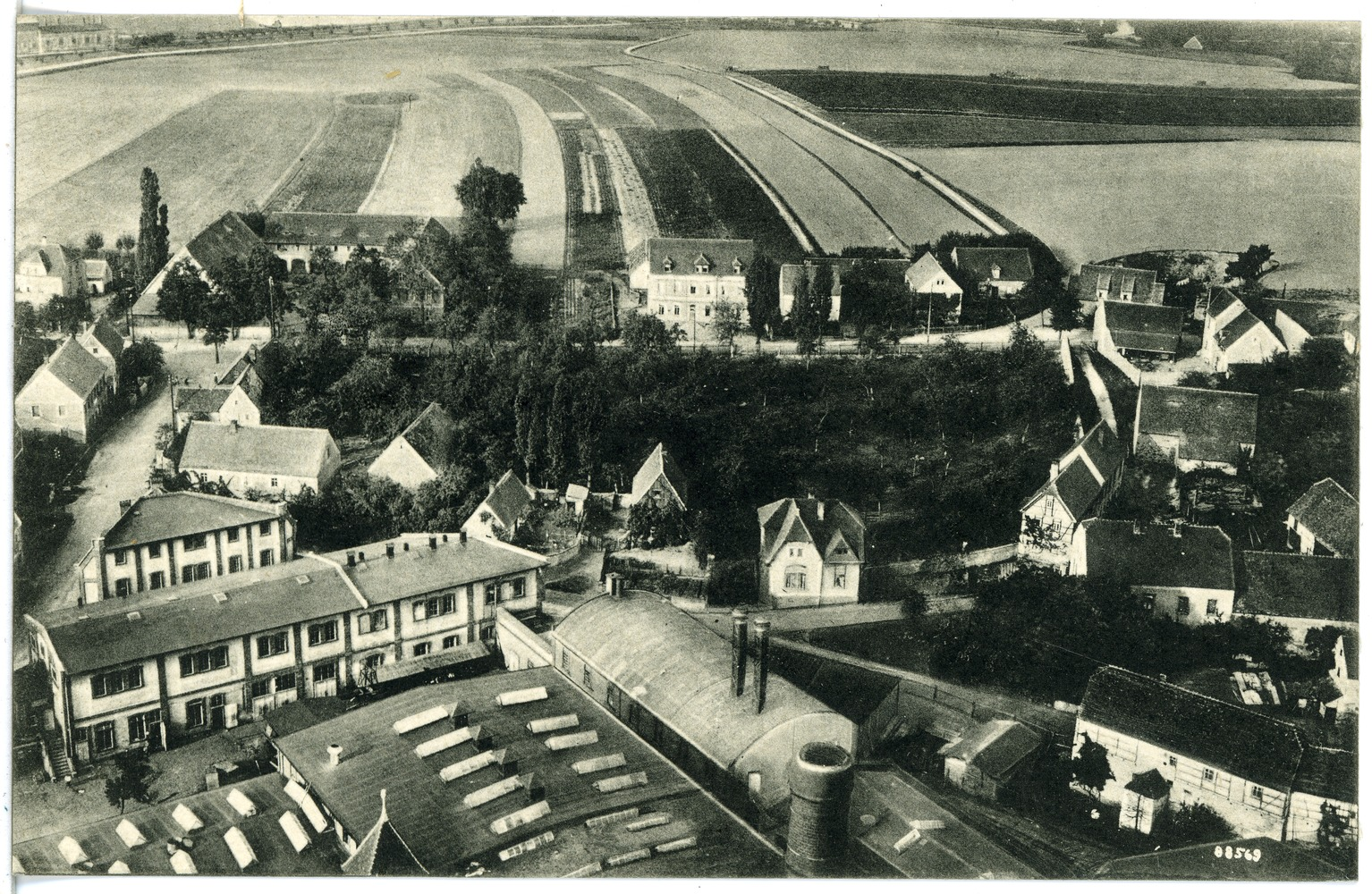 Trebsen; Blick auf Trebsen von der Wiede`schen Esse This postcard is from publisher Brück & Sohn in Meißen ( postcard has a unique number 20539 and is available in a higher resolution at the publisher. This images was uploaded in a cooperation project between Wikipedians and the publisher.